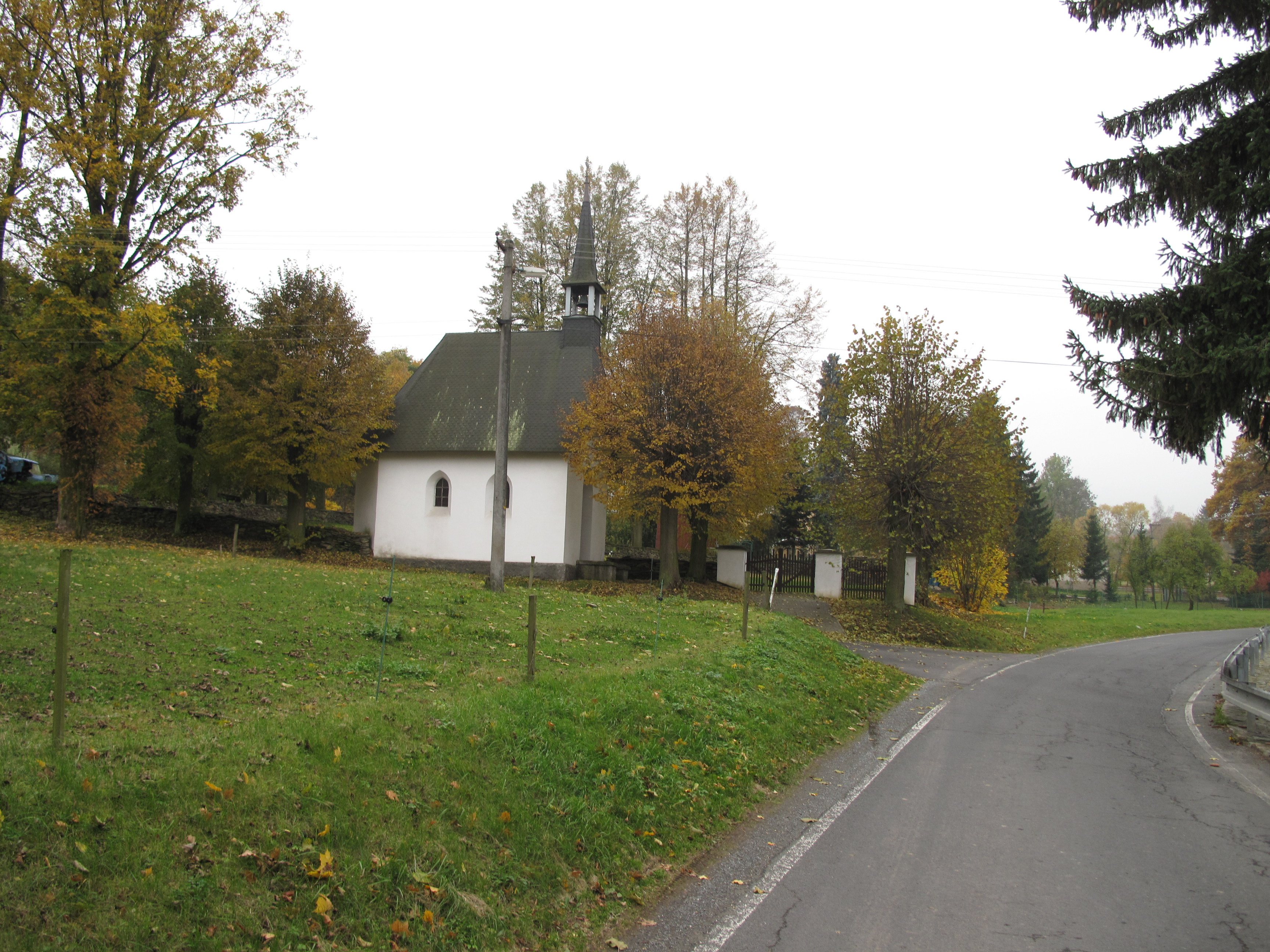 Milotice nad Opavou. Okres Bruntál, Česká republika.